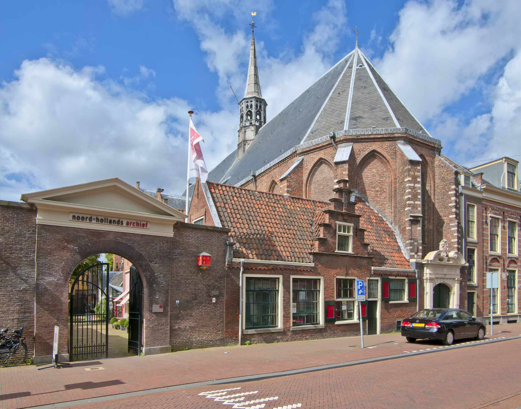 janskerk in haarlem